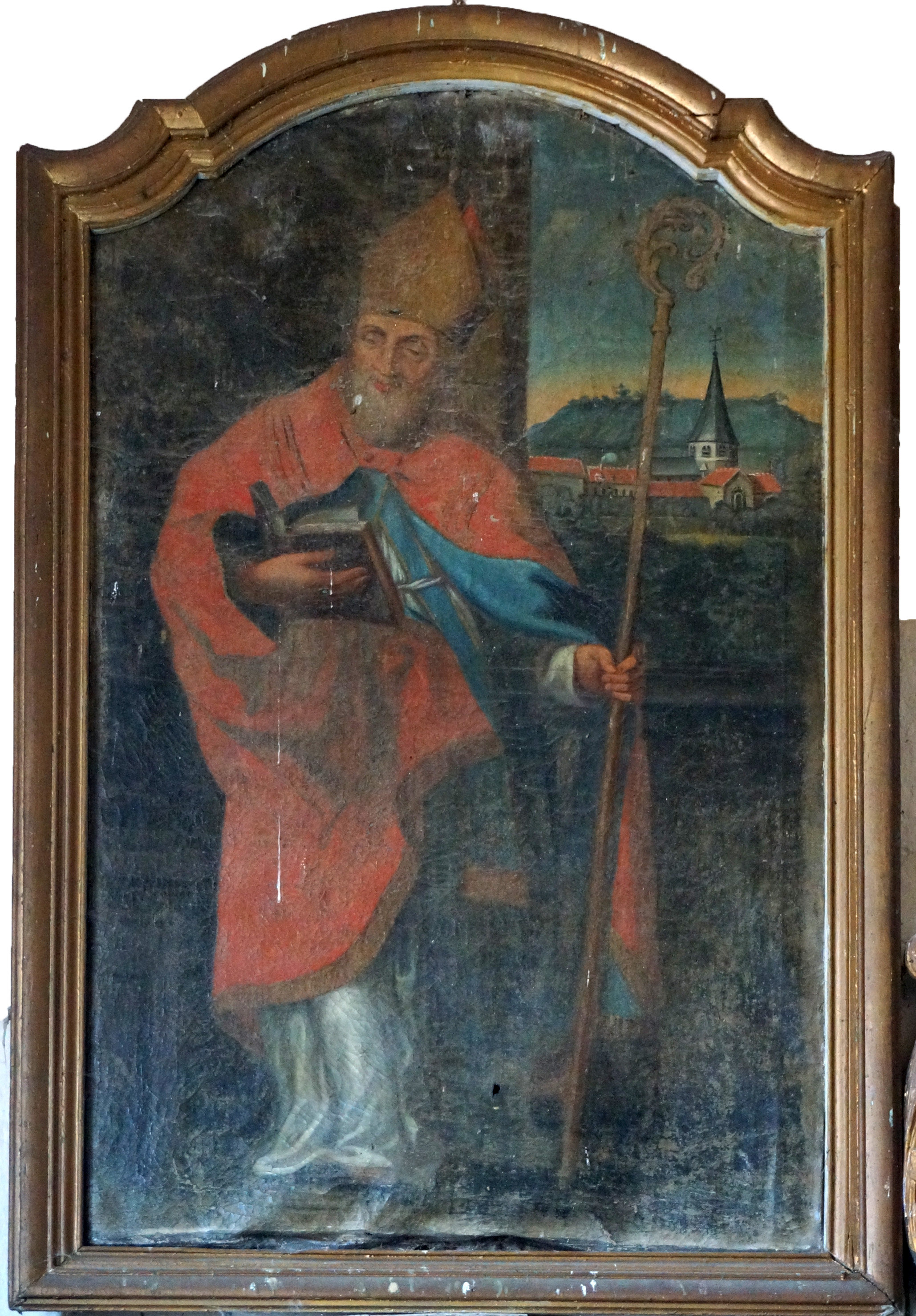 en l'Église Saint-Alpin de Villevenard.